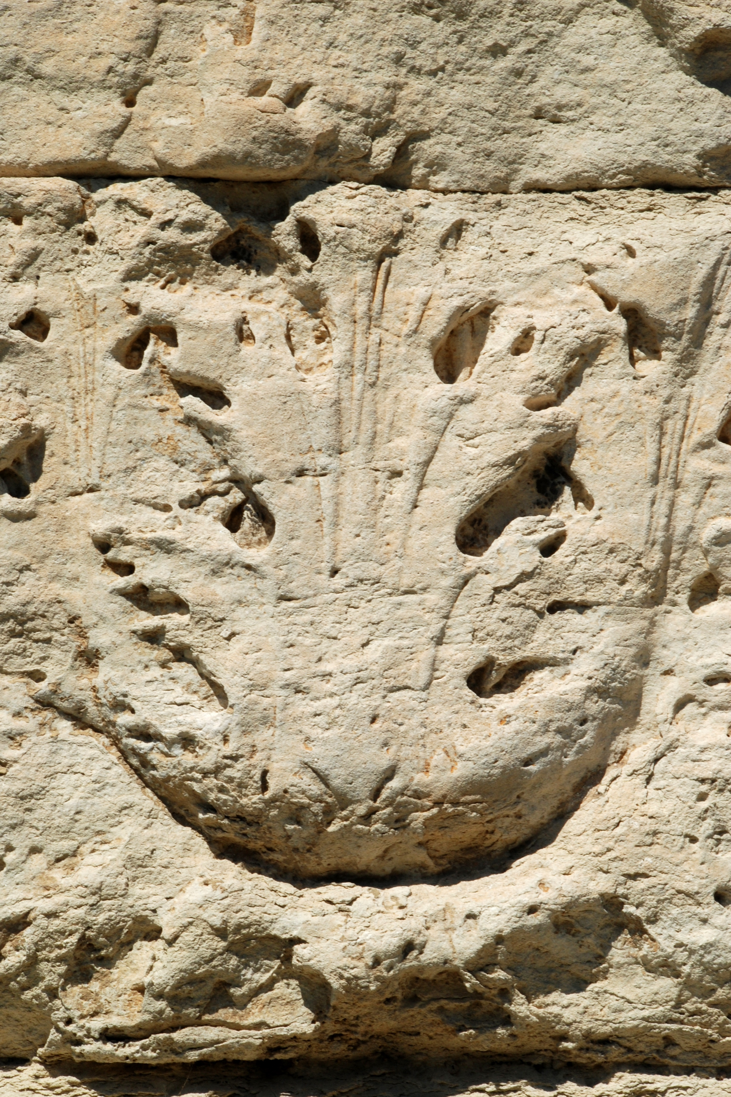 France - Provence - Vaucluse - Arc antique de Cavaillon